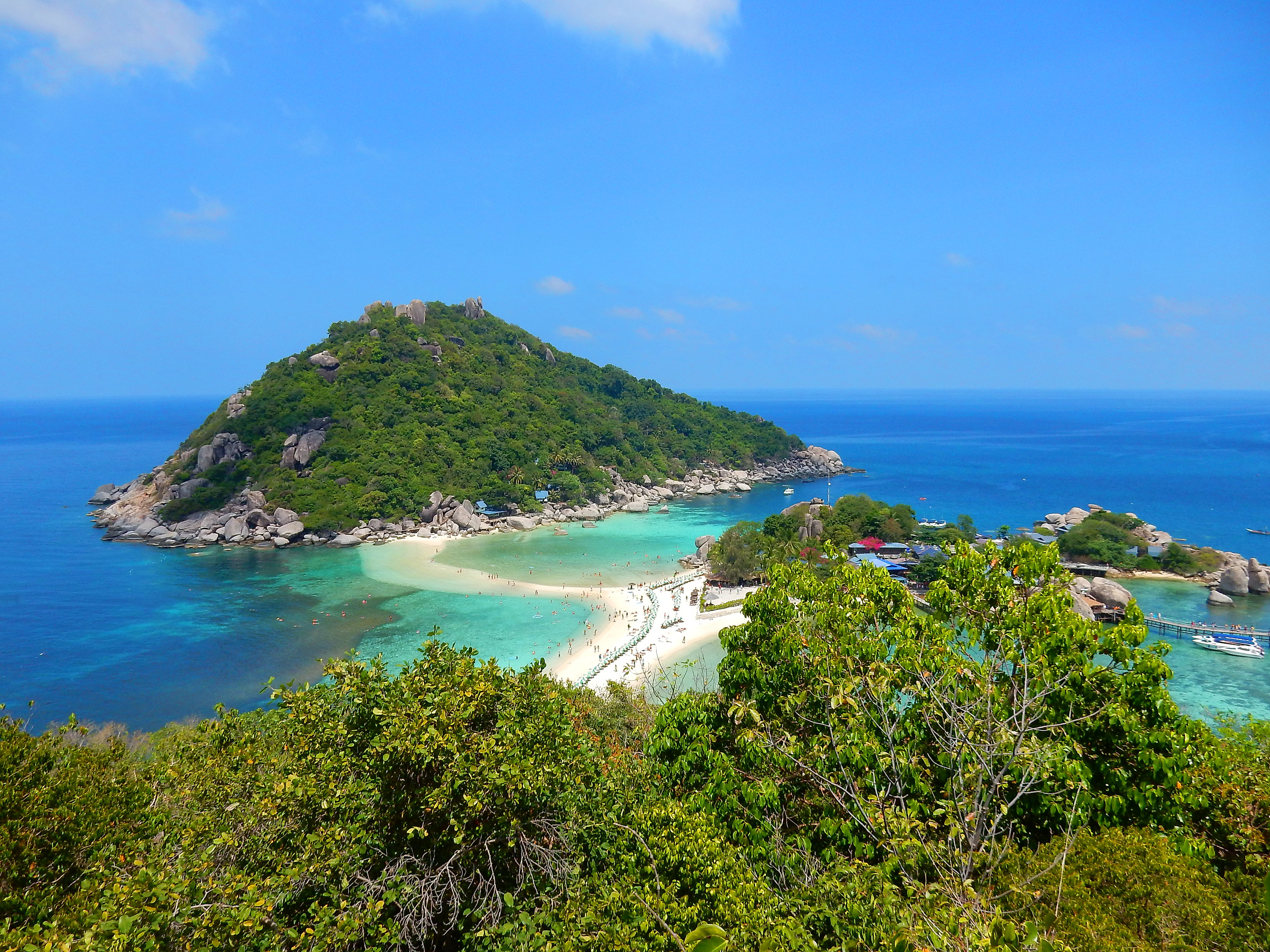 Ko Tao 2015, febr.